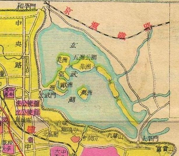 亚新地学社1936年《袖珍中华全图》中的南京市地图部分。